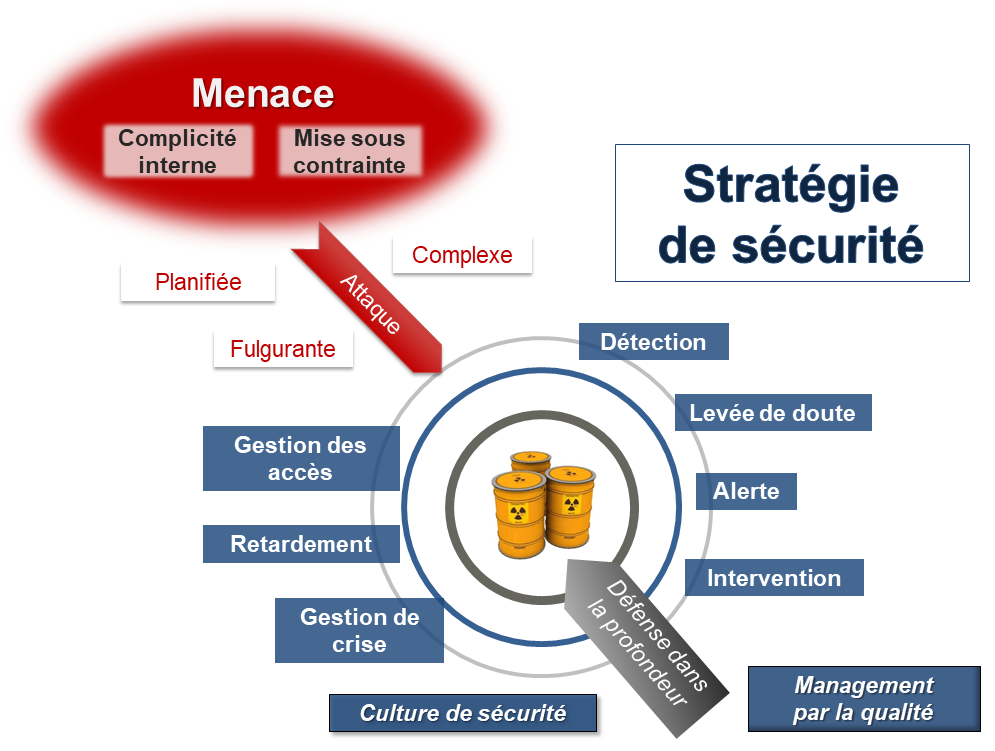 Description des fonctions de sécurité nucléaire composant le système de sécurité nucléaire des opérateurs en France